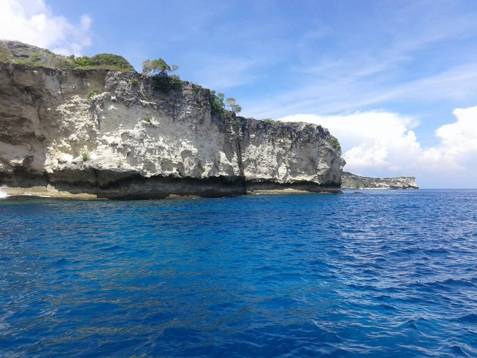 Atauro